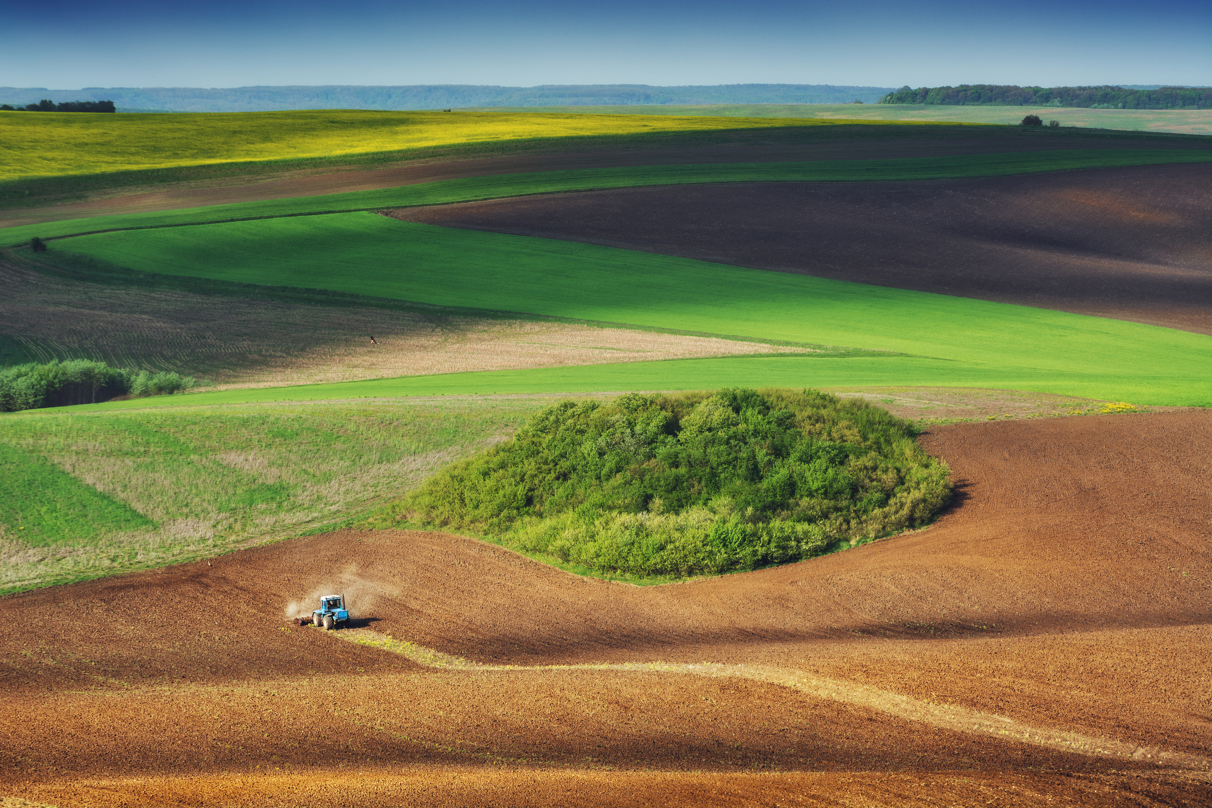 «Касова Гора», Галицький район, с. Бовшів